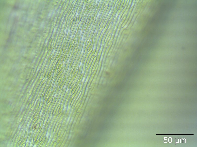 Großes Grünstängelmoos (Scleropodium purum), Laminazellen, Vergrößerung: 400x